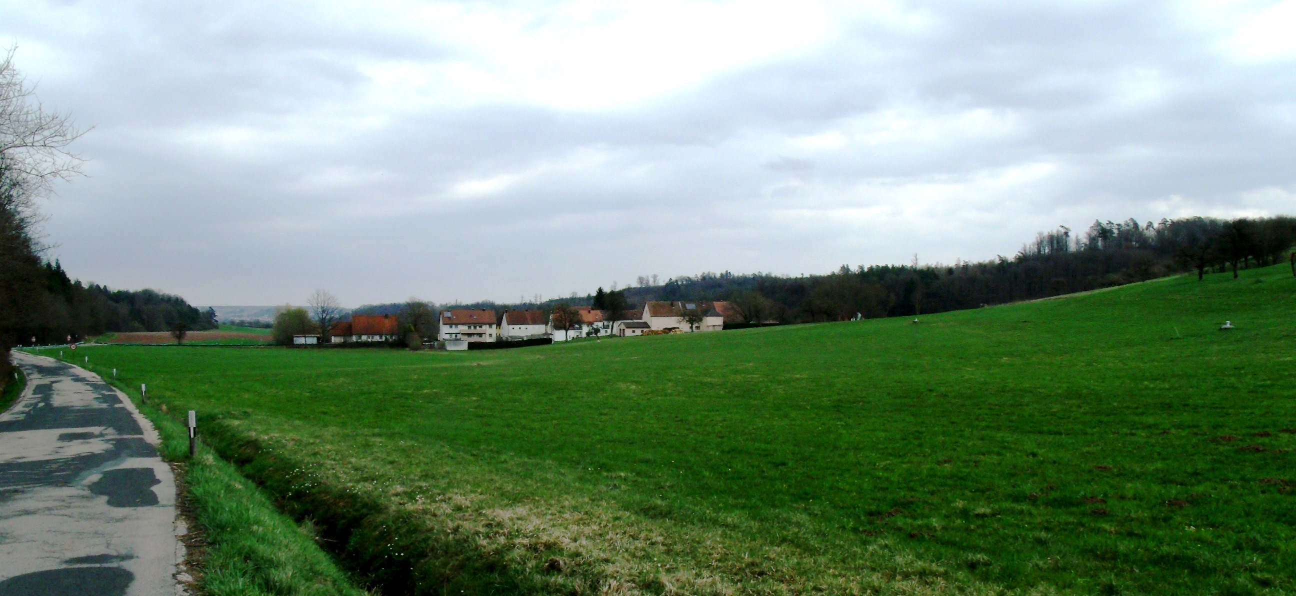 Geisengrund, Ortsteil von Ansbach